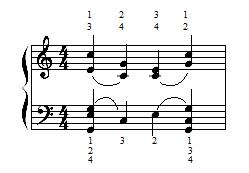 Kreuzgriffe